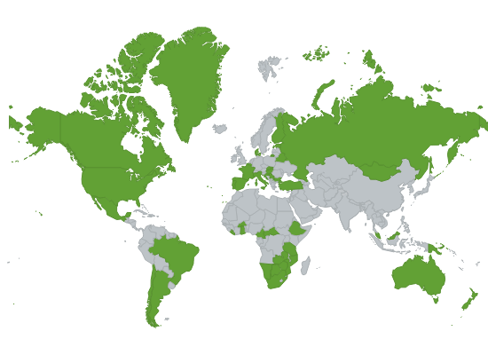 Weltkarte Bogenjagd